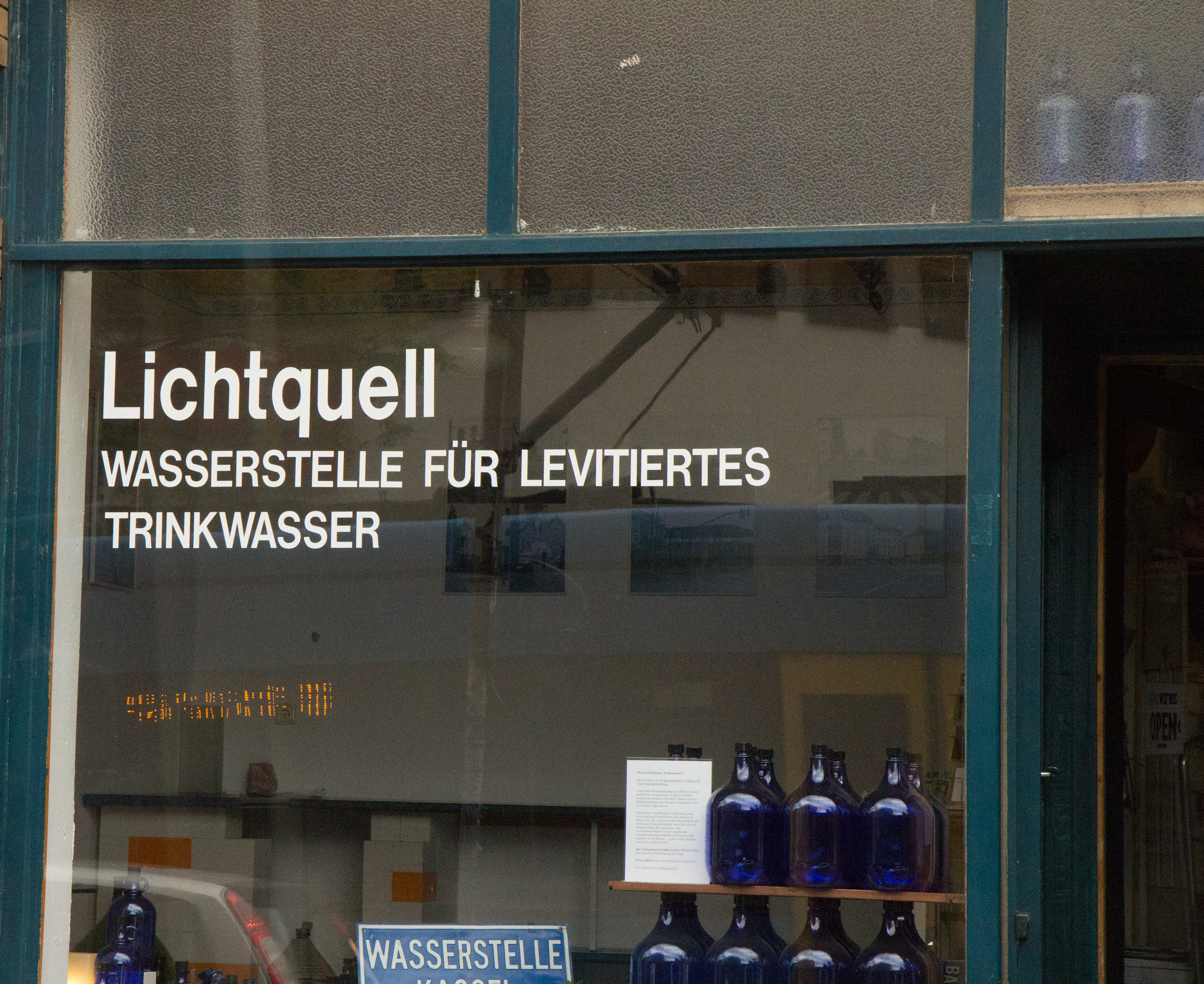 Einkaufsladen für Levitiertes Wasser in Kassel